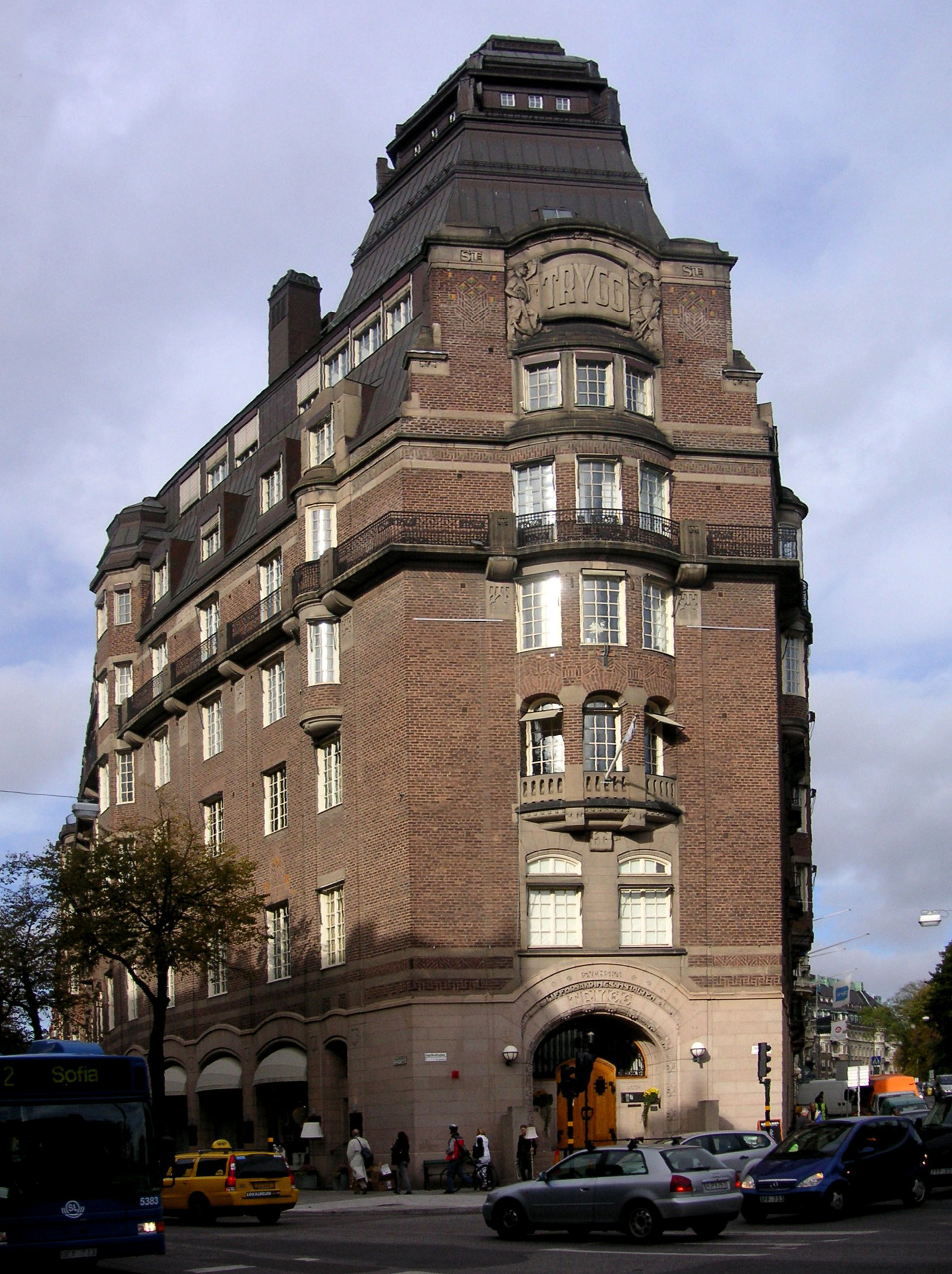 Erik Lallerstedt, Trygghuset, Stockholm 1907-10